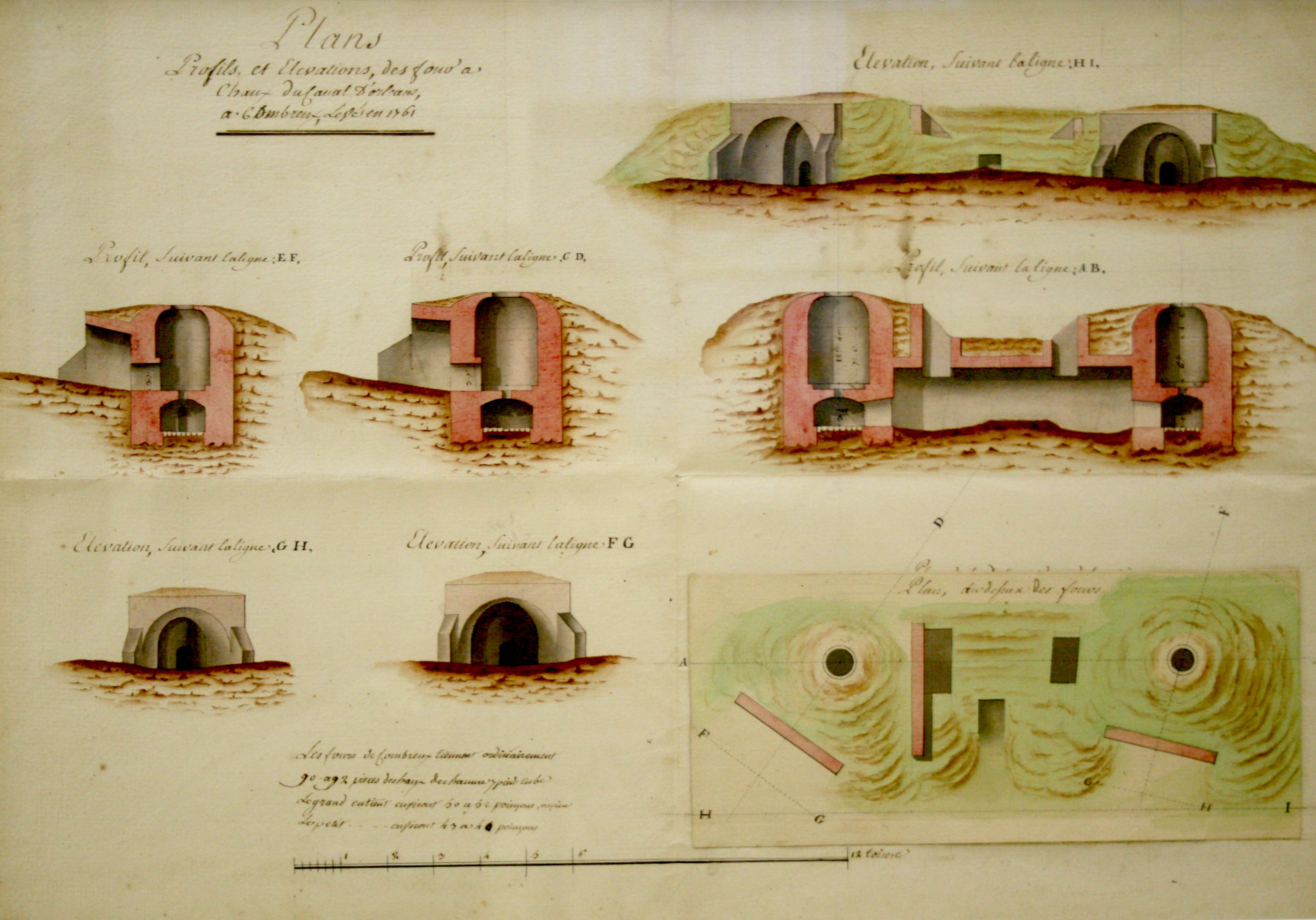 Plan des four à chaux, l'ancêtre du ciment, à Combreux (1760)